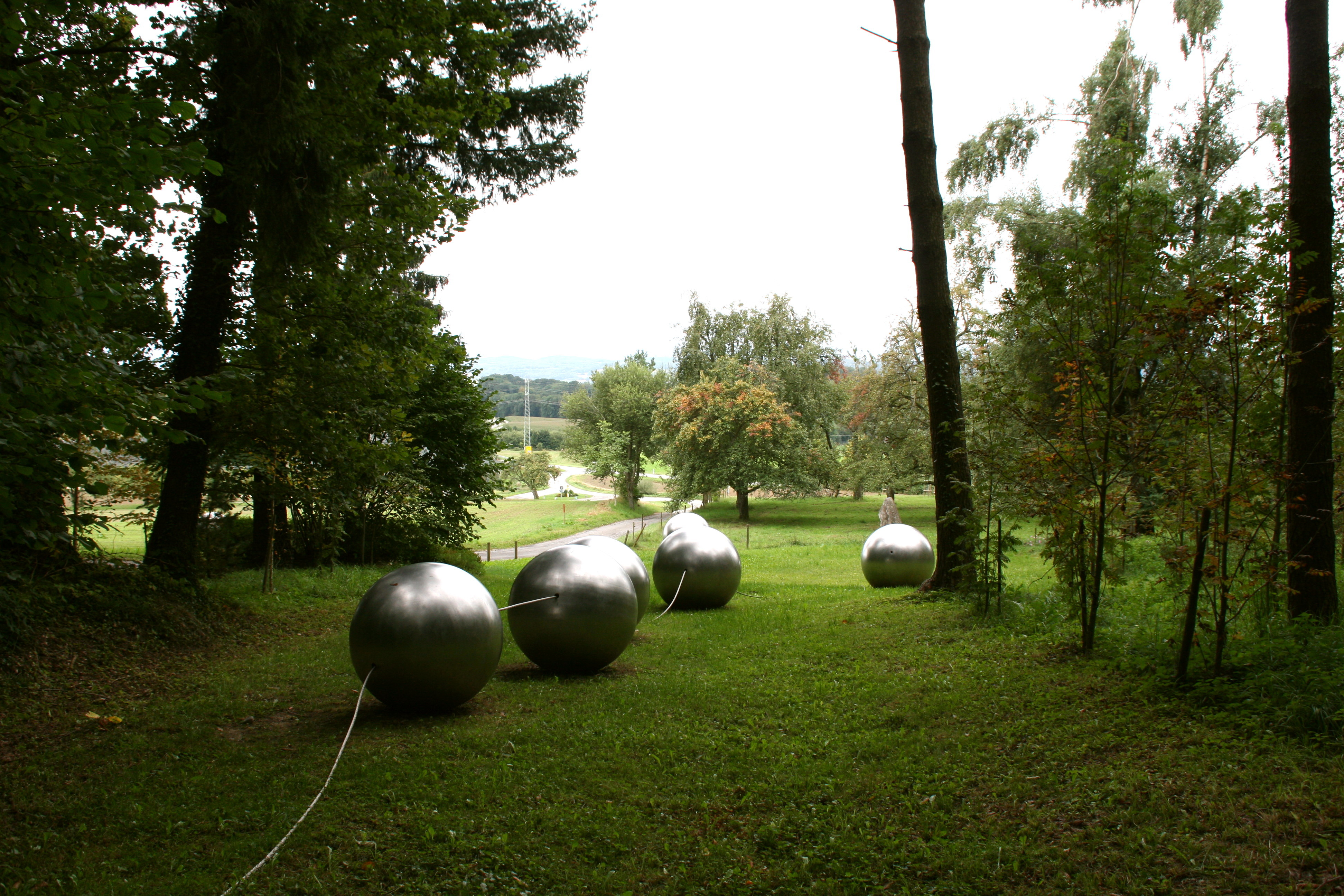 „Die zerrissene Perlenkette“, Winterhaldenweg in Hödingen, Überlingen